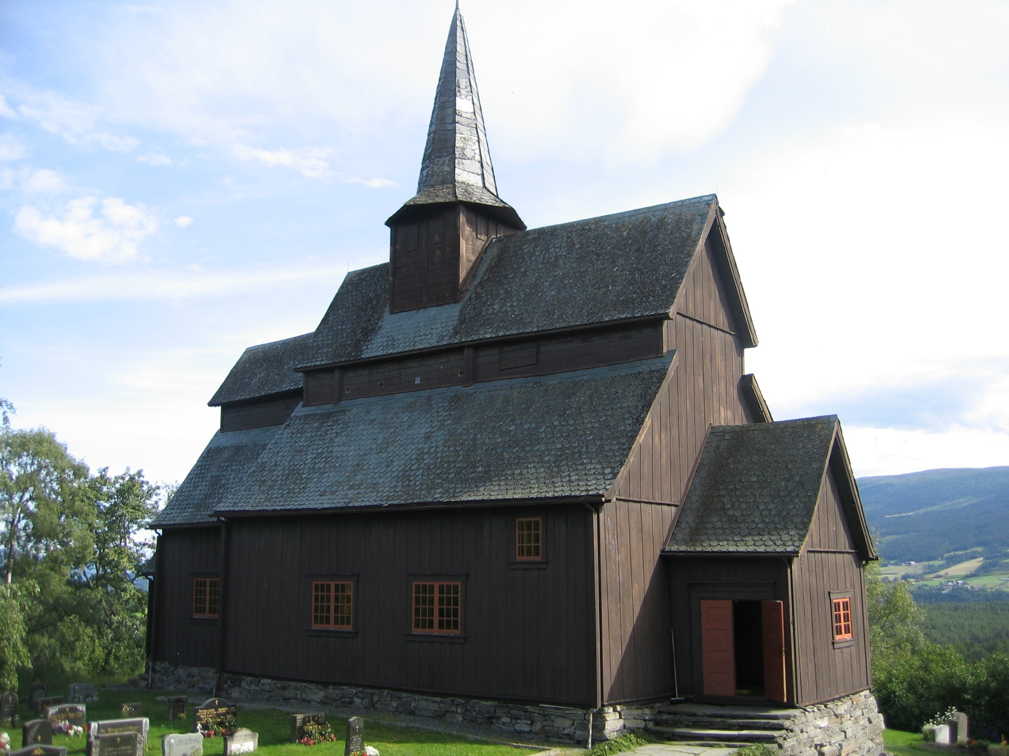 no: Høre stavkyrkje en: Høre stave church